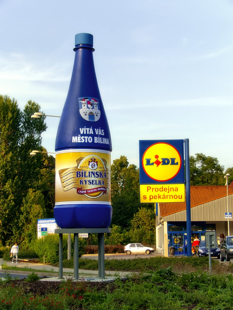 Láhev Bílinská Kyselka